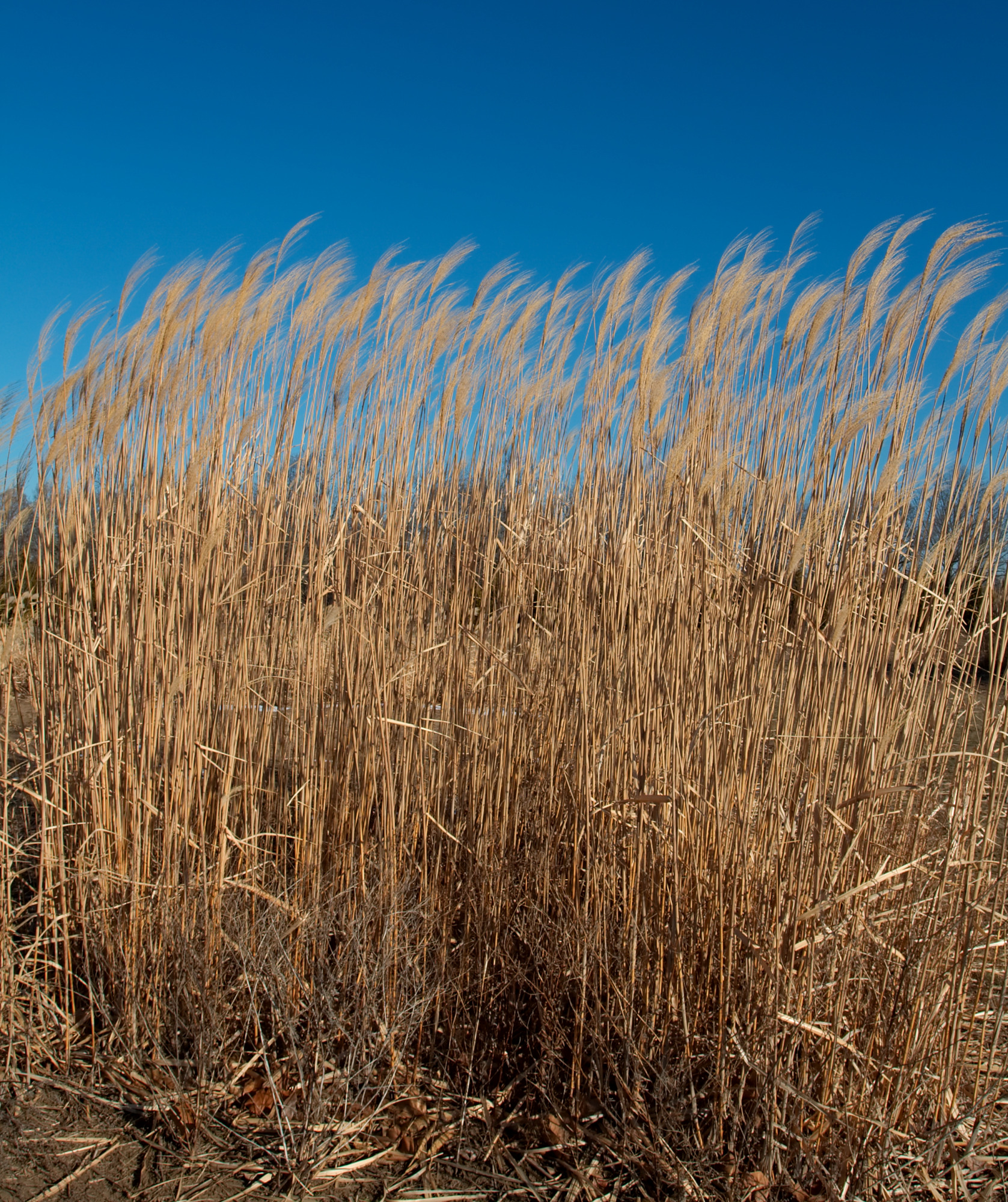 Giant Reeds, arundo donax taken in Urbana, IL